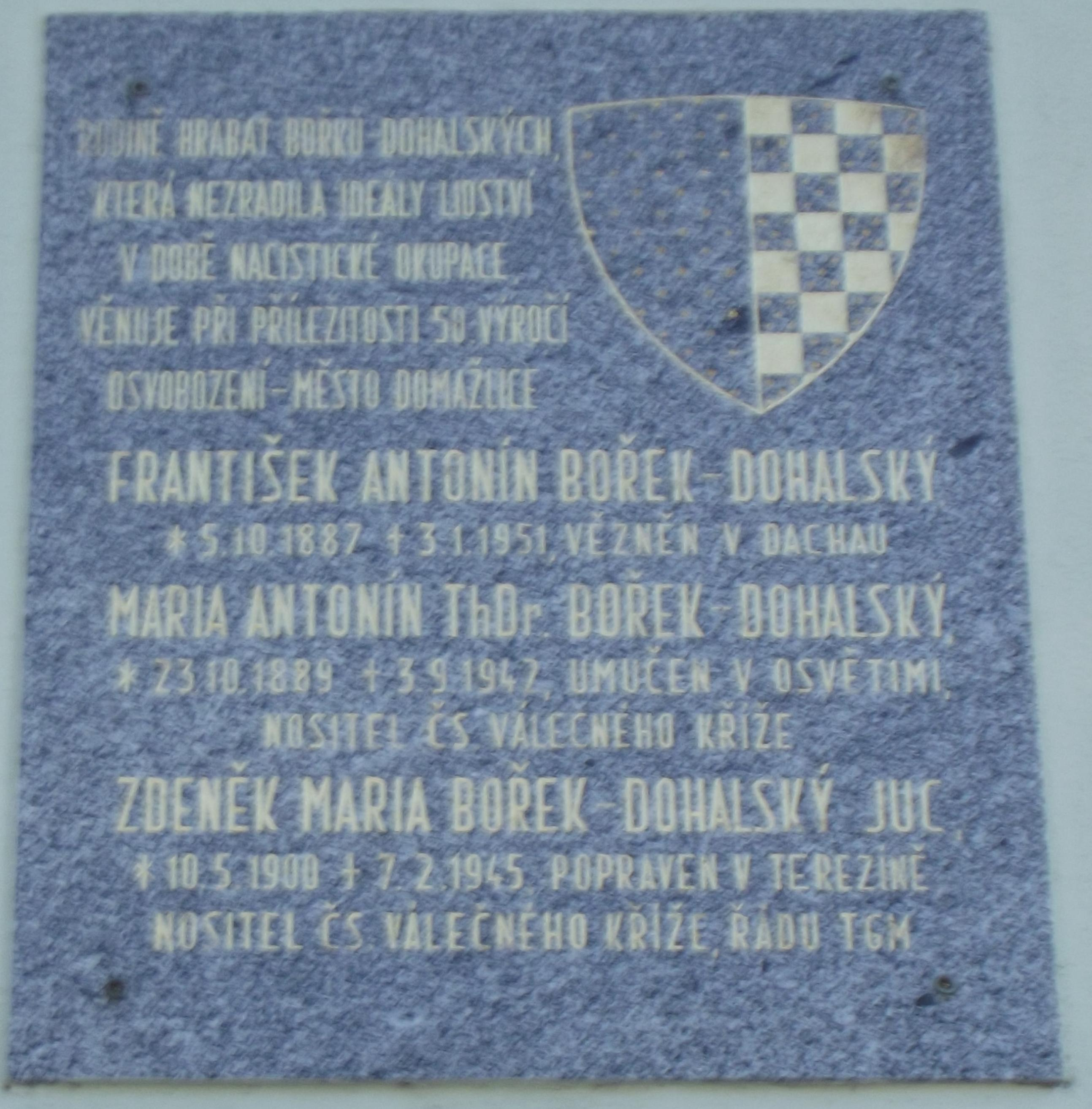 Památník starého českého hraběcího rodu Bořků z Dohalic, nainstalovaný na fasádě domu čp. 68 na náměstí Míru v Domažlicích.